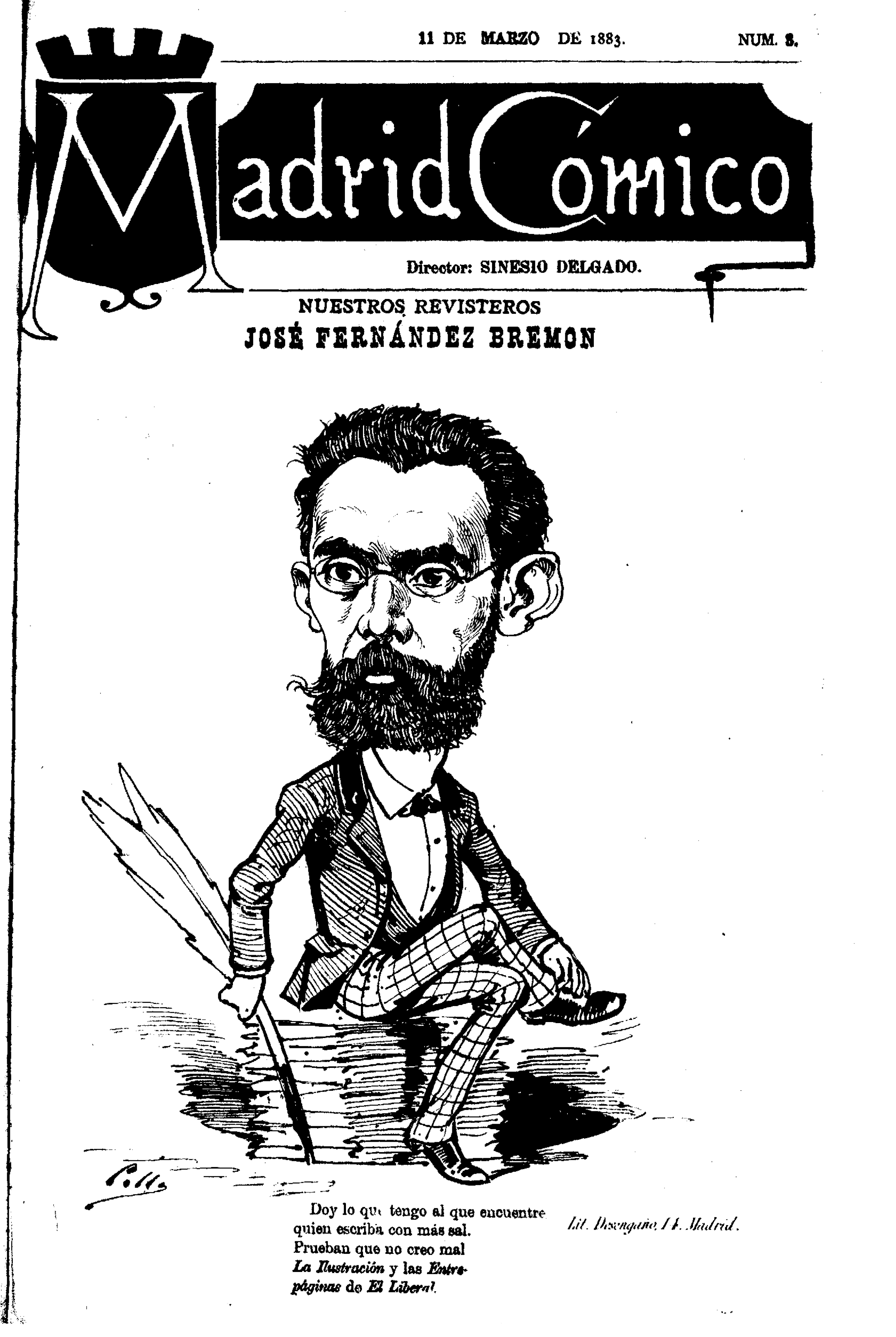 Madrid Cómico, 11 de marzo de 1883.